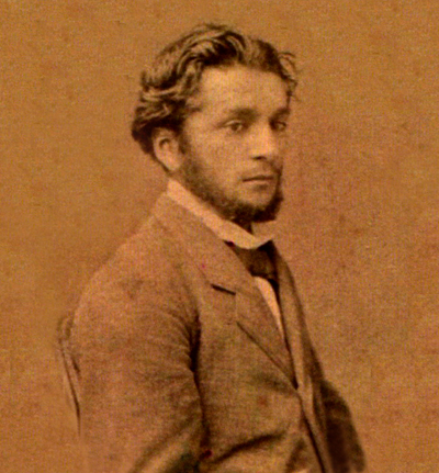 retrato del pintor